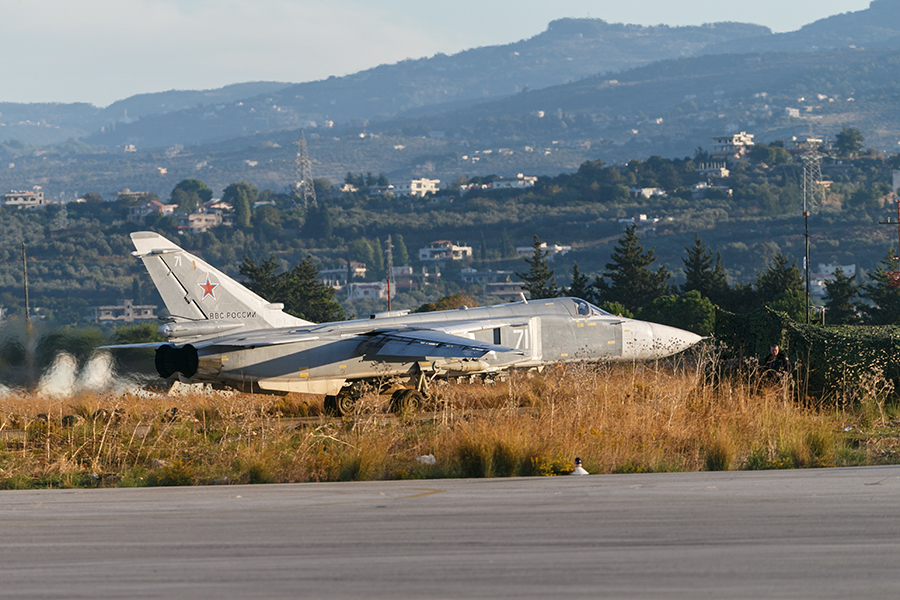 Будни авиагруппы ВКС РФ на аэродроме Хмеймим в Сирии